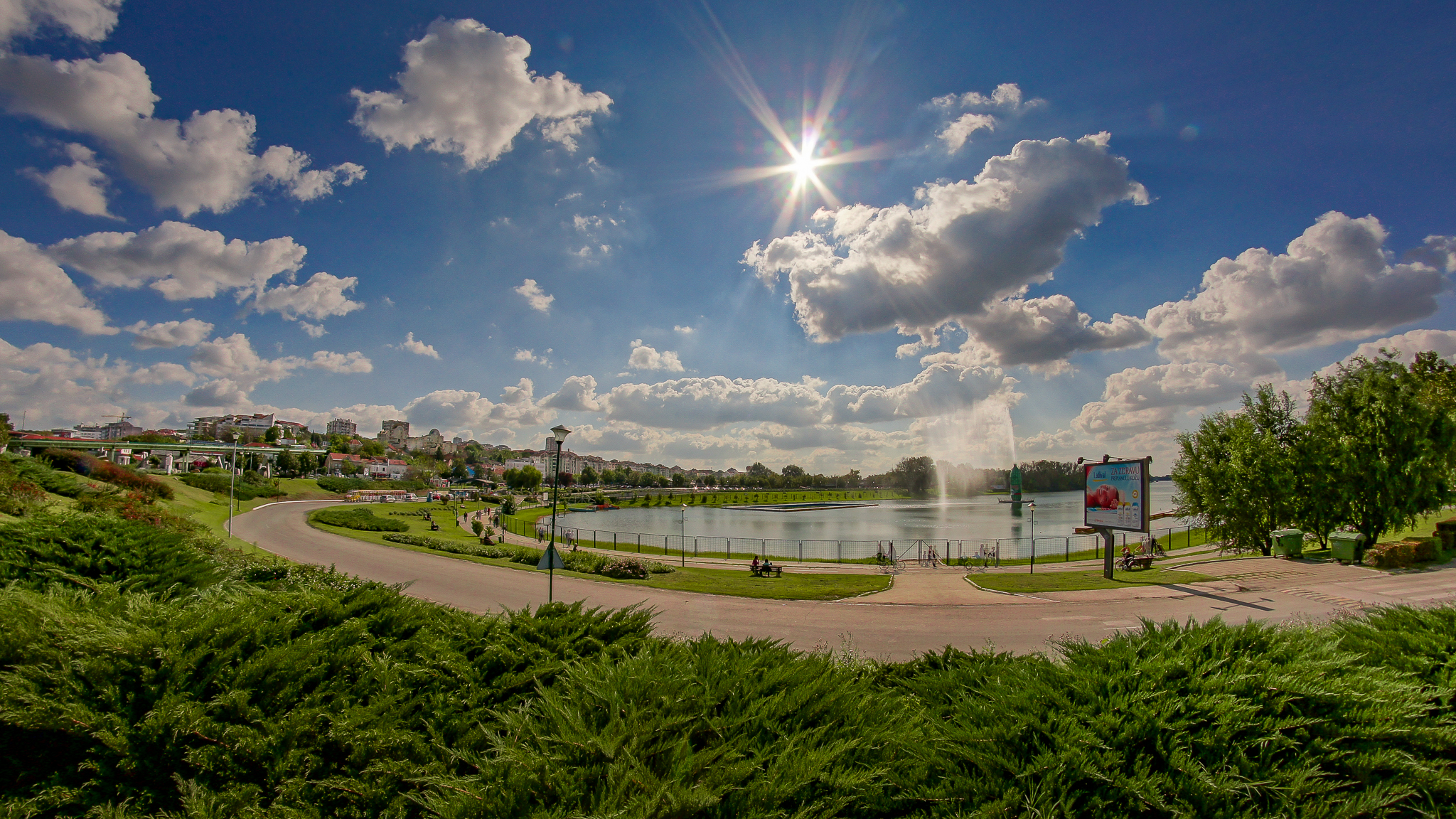 ЗС01 Pogled na Adu sa pesacke staze